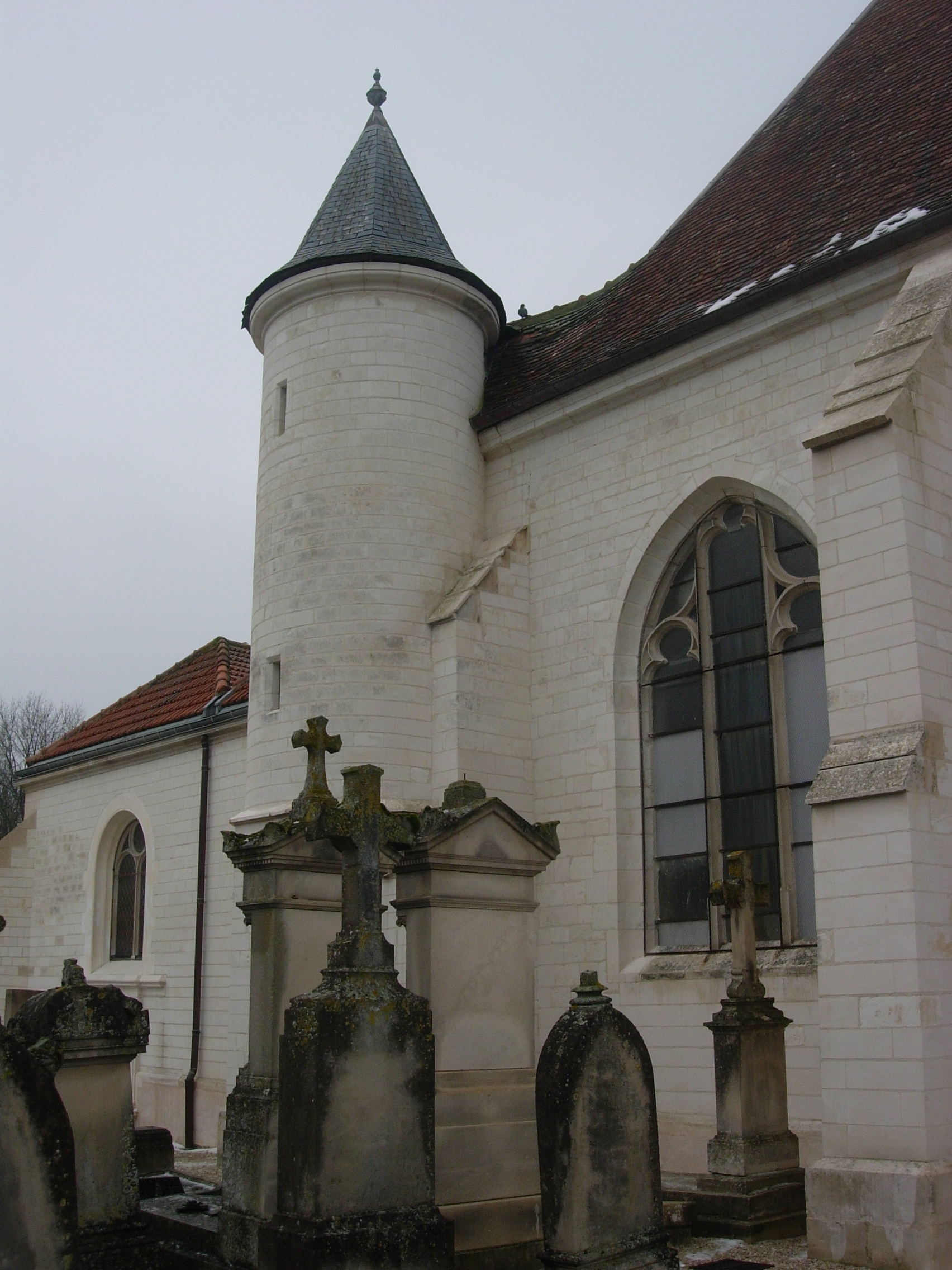 Eglise de Saint-Léger-près-Troyes